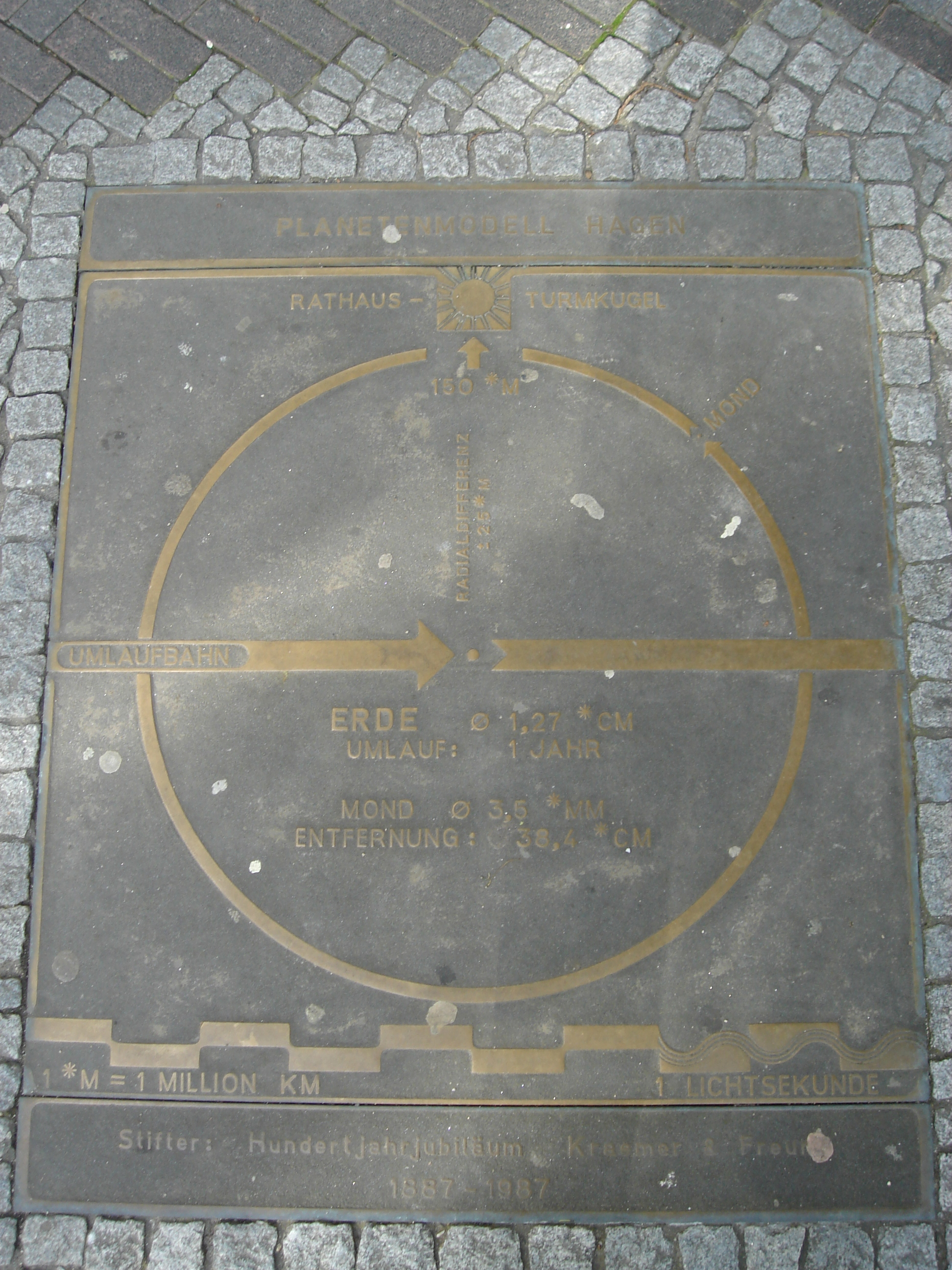 Im Boden eingelassene Bronzeplatte mit den Daten der Erde. Ein Bestandteil des Hagener Planetensystem-Modell